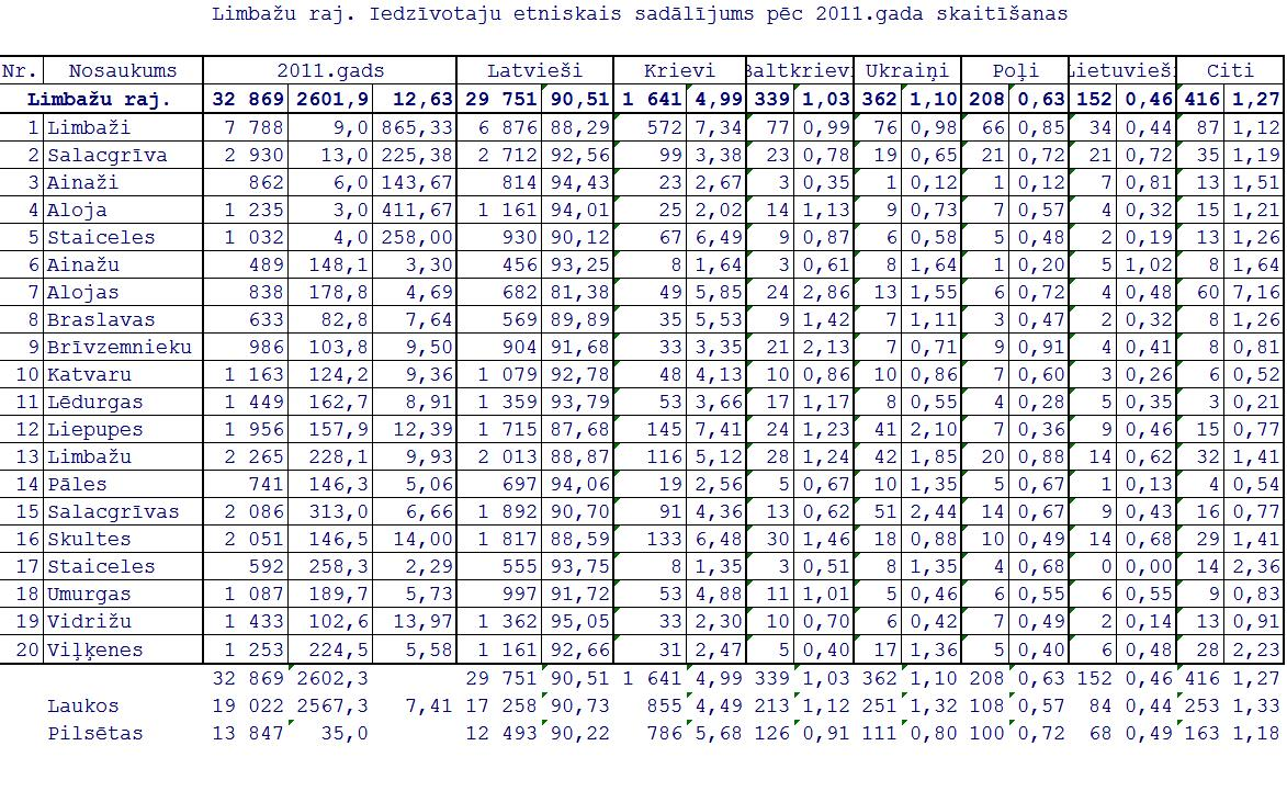 Latvijas 2011 gada tautas skaitīšanas dati